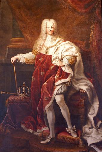 Caption from the museum's website Nel Settecento Clementina è la principale ritrattista della dinastia sabauda e della nobiltà piemontese che raffigura con grande attenzione per la resa dei materiali e con sapienti tocchi in punta di pennello per dare luce ai particolari. I ritratti dei membri della famiglia reale da lei realizzati vengono inviati alle principali case regnanti europee e donati a nobili, funzionari, chiese e comunità del Regno. Carlo Emanuele III (1701-1773) è qui raffigurato in abito di gala, con il collare dell’ordine equestre dell’Annunziata e le insegne del potere su un cuscino; sulla cappa di velluto rosso ed ermellino appaiono i simboli della dinastia: il nodo, la croce d’argento e l’aquila nera. Prima dell'ingresso in Museo, nel 1895, il dipinto era conservato nei magazzini del Municipio. Nel Museo si conserva anche uno dei primi dipinti di Clementina, il ritratto di Cristina Luigia di Baviera (1722), moglie di Carlo Emanuele III (742/D).